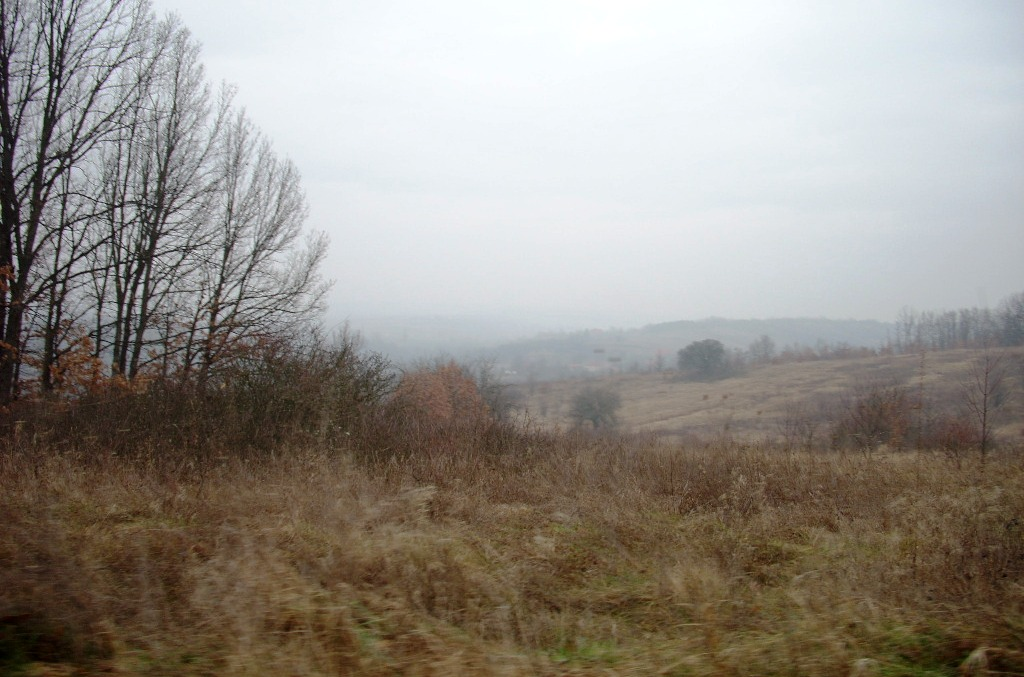 Predeo oko Zorovca